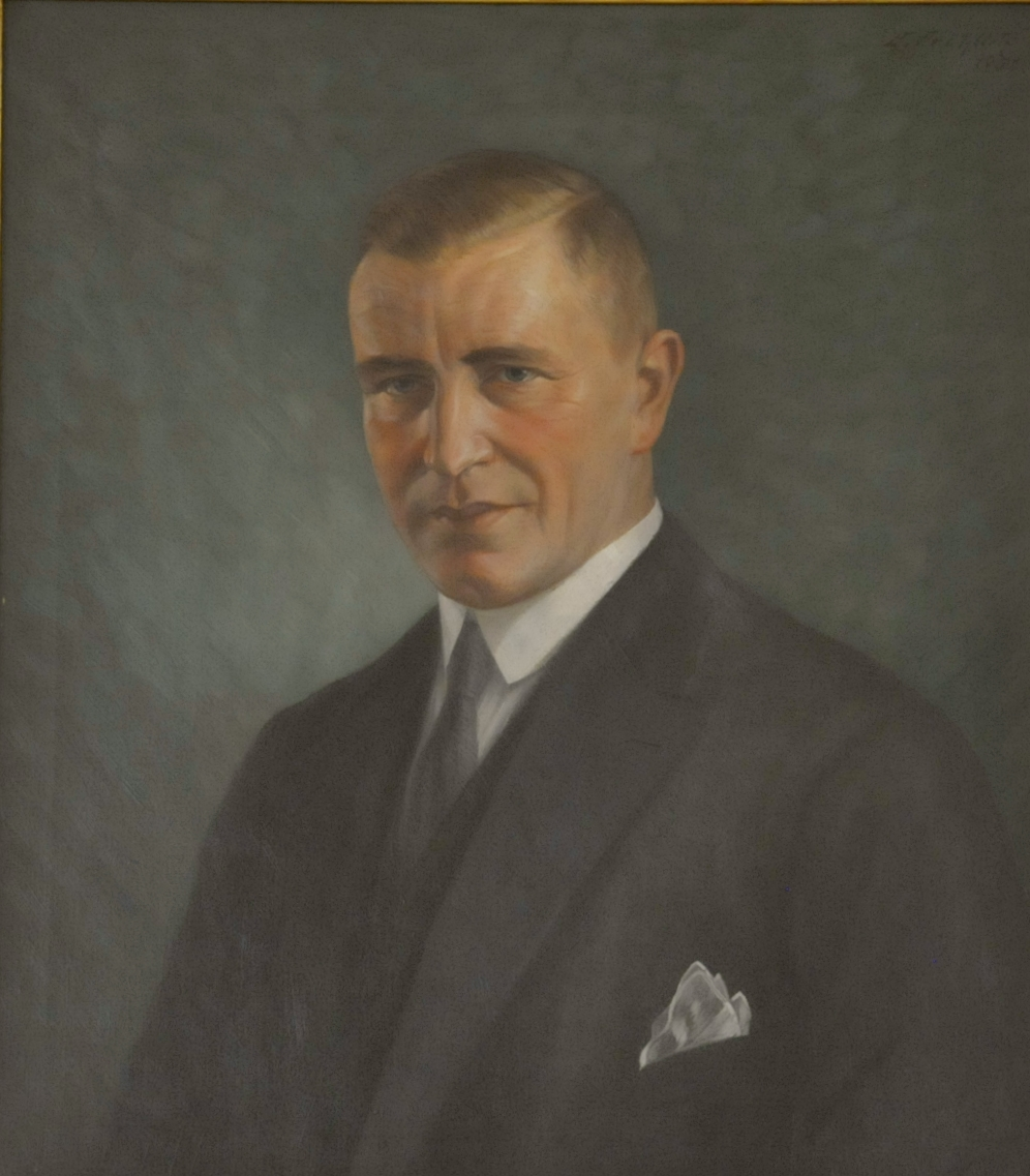 Porträt von Dr. jur. Hans Ullrich